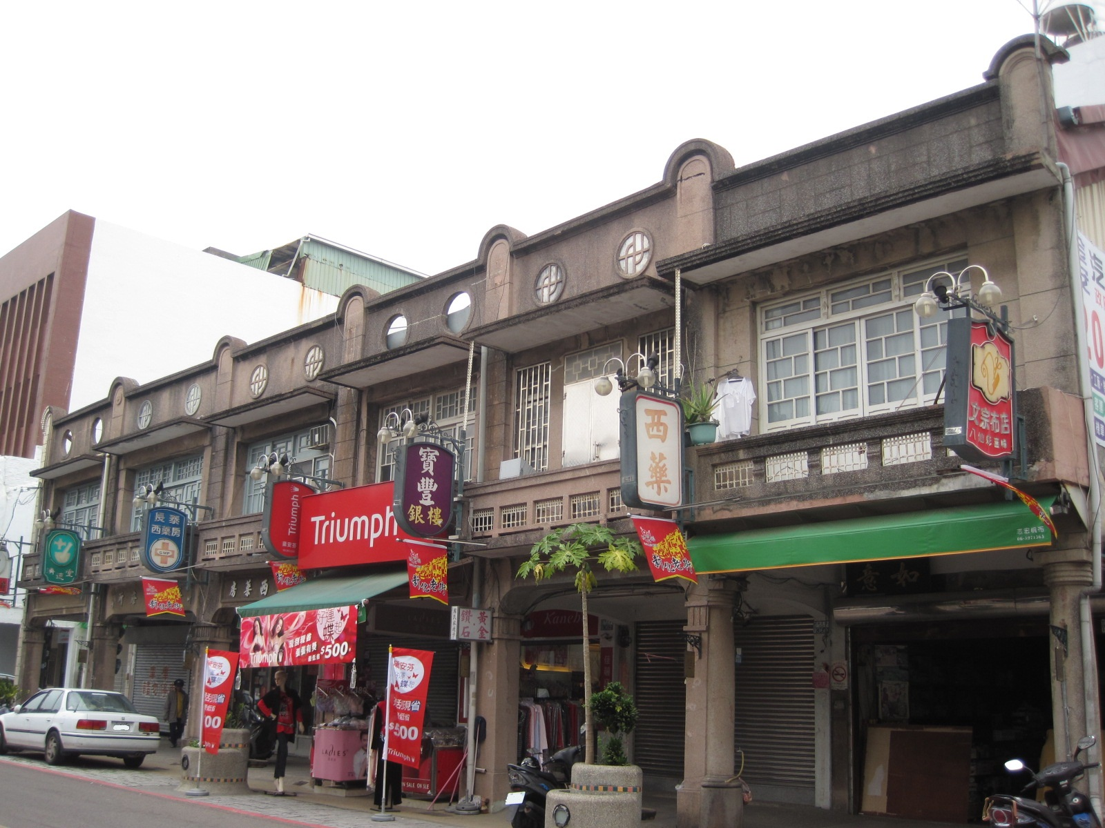 新化老街Bân-lâm-gú: Tâi-lâm Sin-huà ê kū ke-á. 臺南新化的舊街仔。